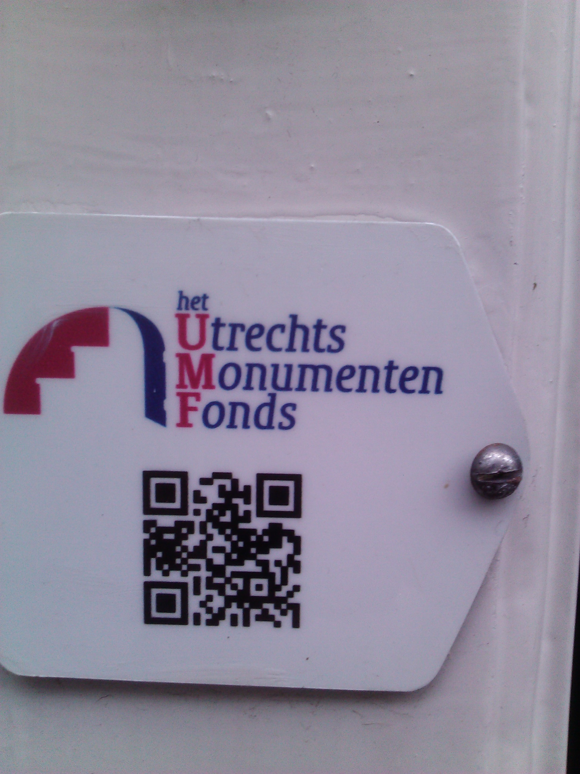 Loef Berchmakerstraat 21, Utrecht Monumentenschildje